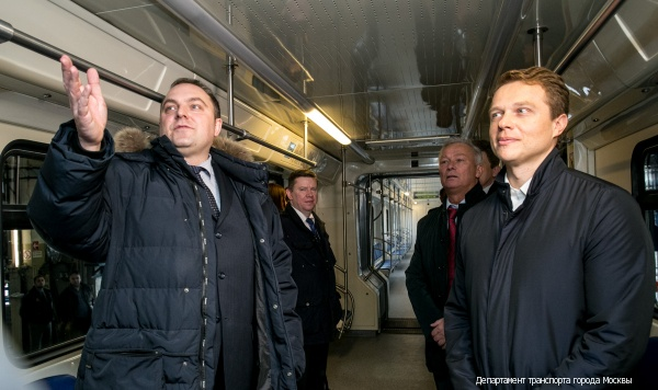 Начальство Московского метрополитена в салоне электропоезда 81-760А/761А/763А